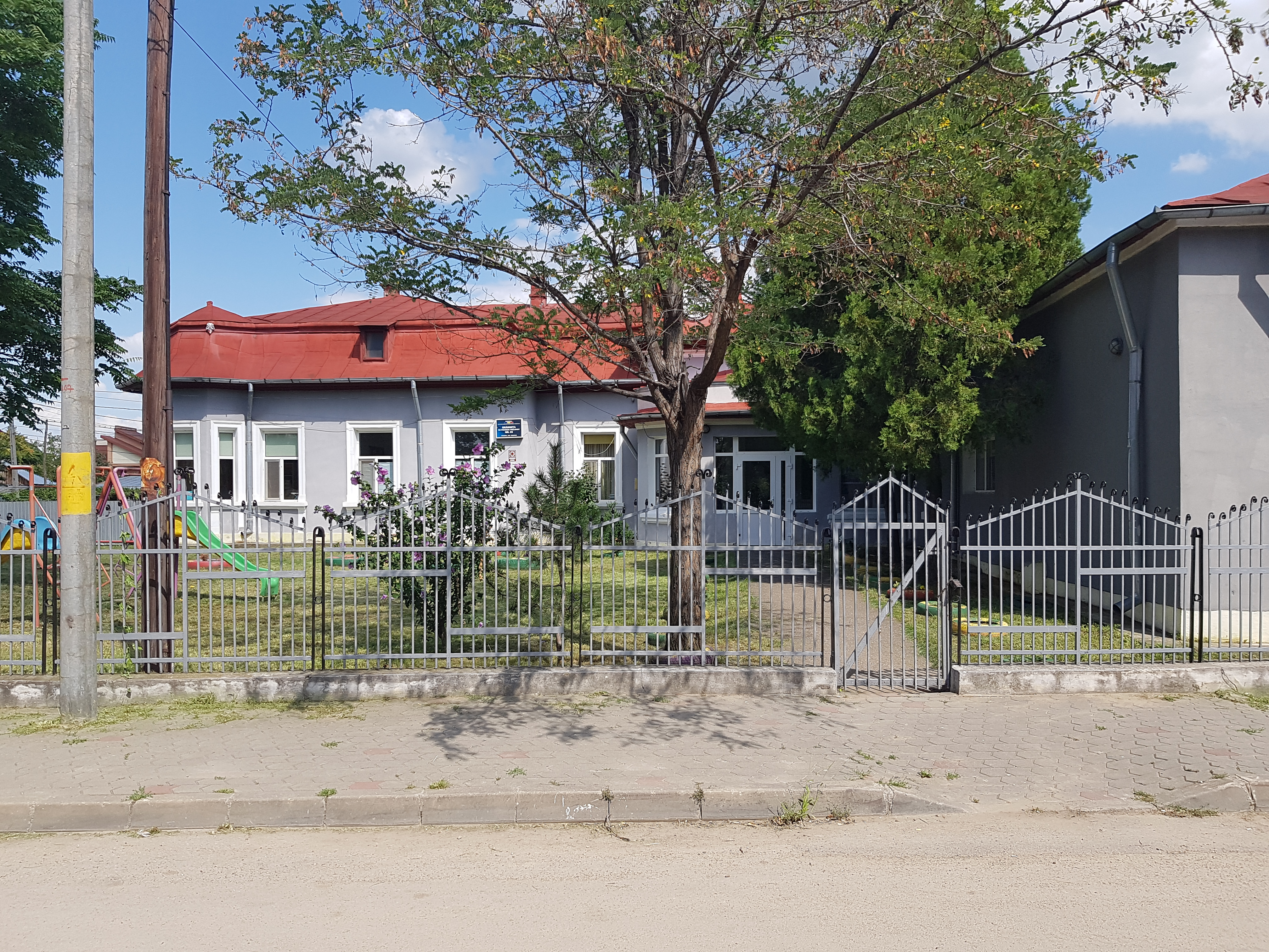 Grădinița nr. 23